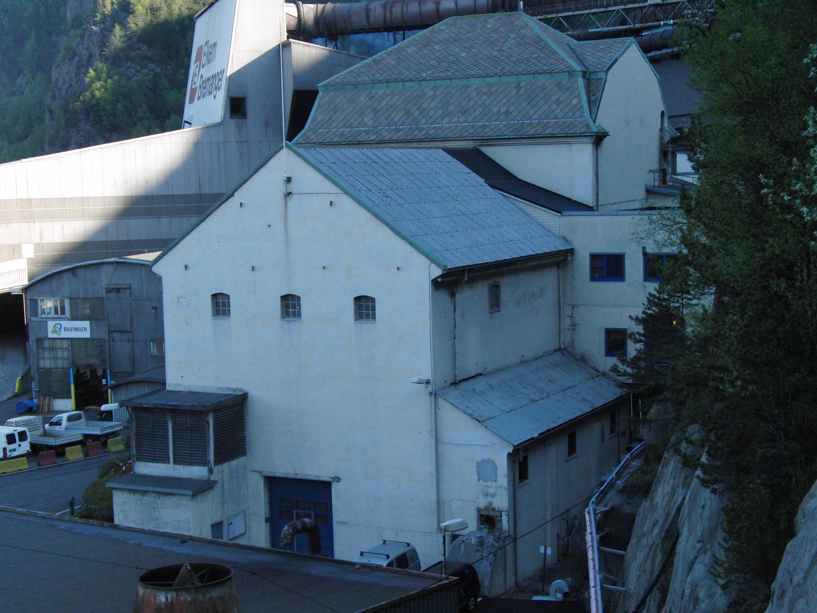 Svelgen I kraftverk